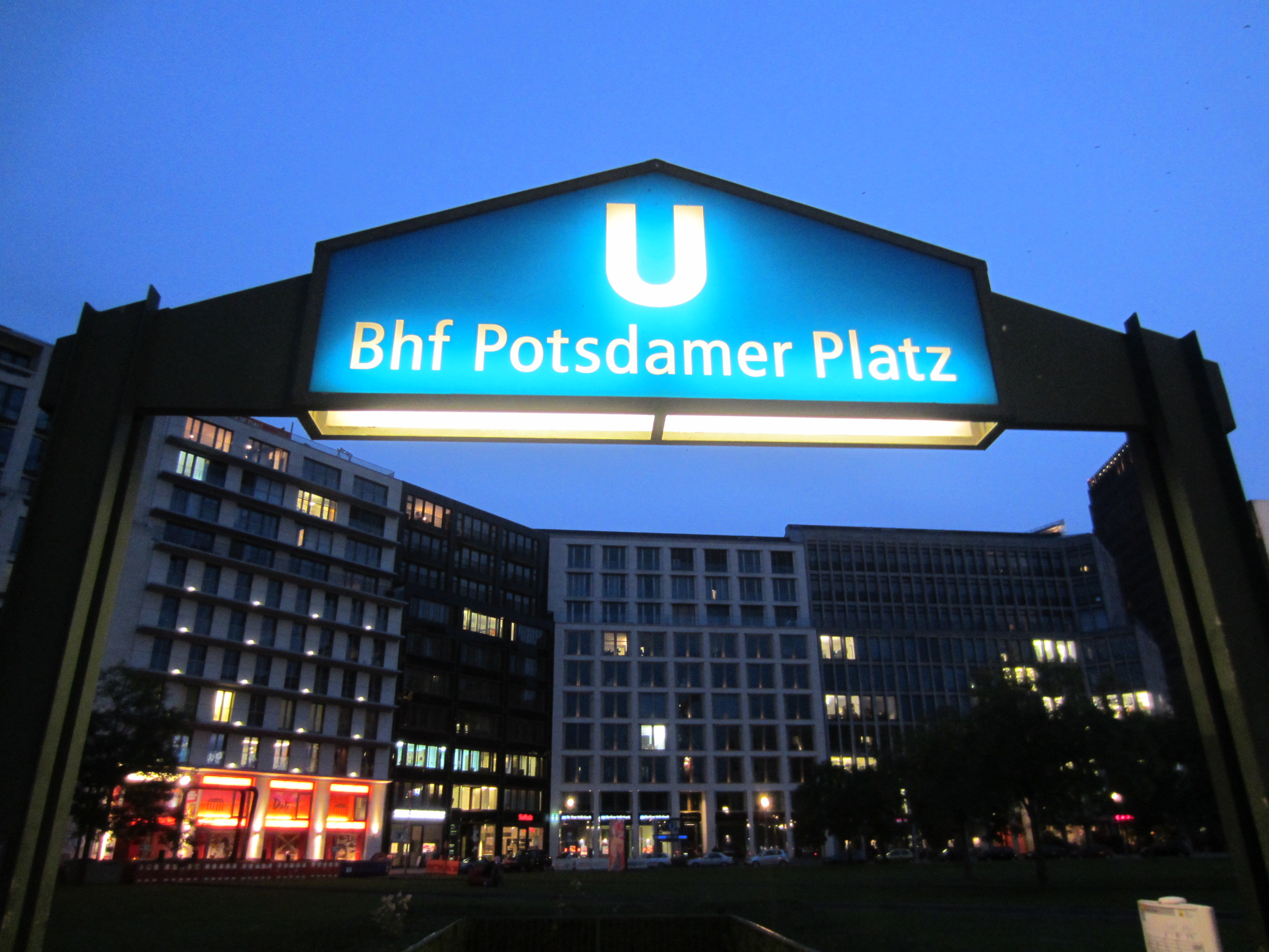 Eingang zum U-Bahnhof Potsdamer Platz in Berlin